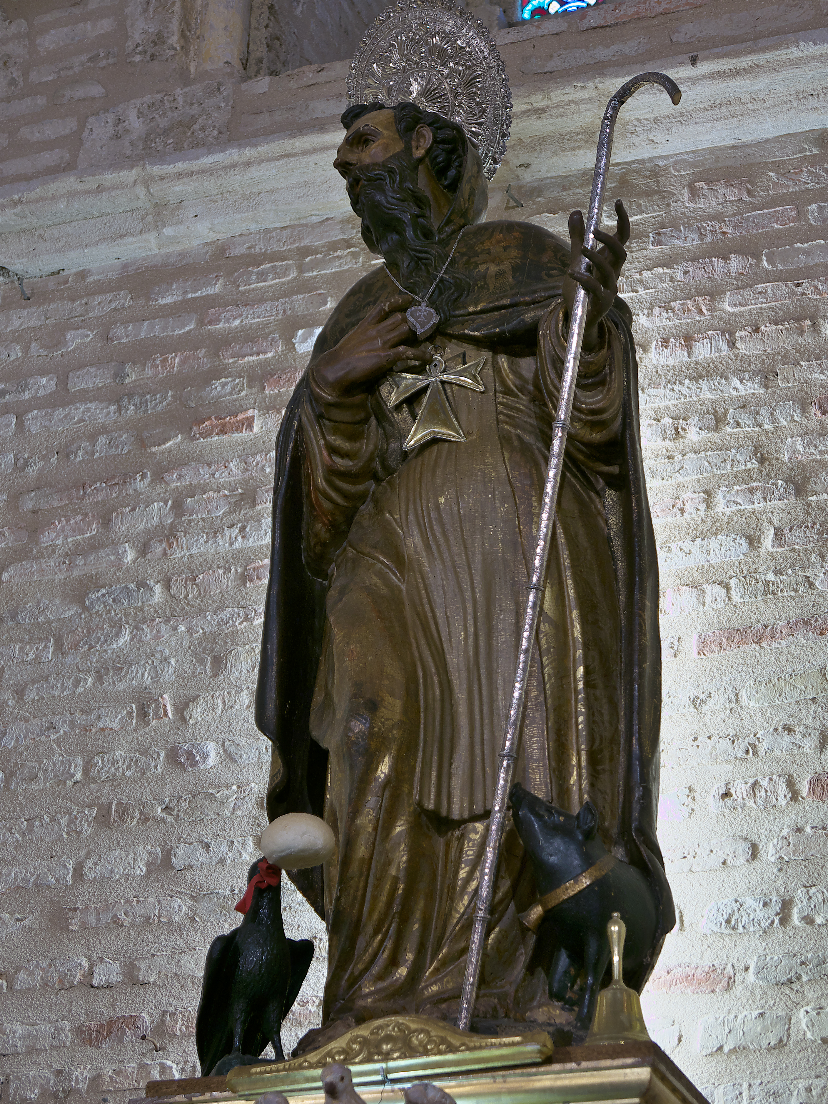 San Antonio Abad, patrón de Trigueros.